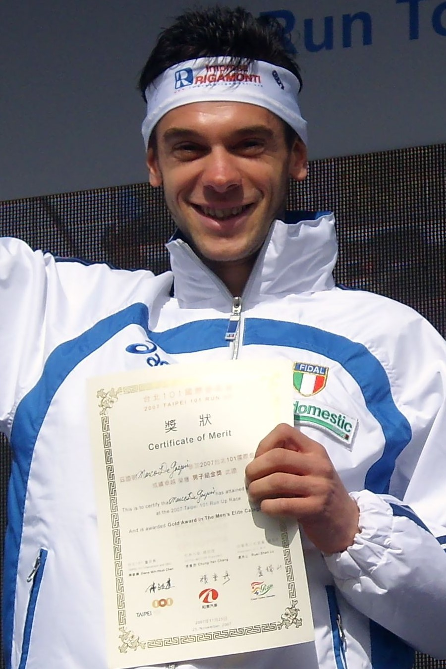 2007 Taipei 101 Run Up - Elite Group: Marco De Gasperi.